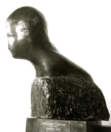 Dimitrie Paciurea - Himera apei.